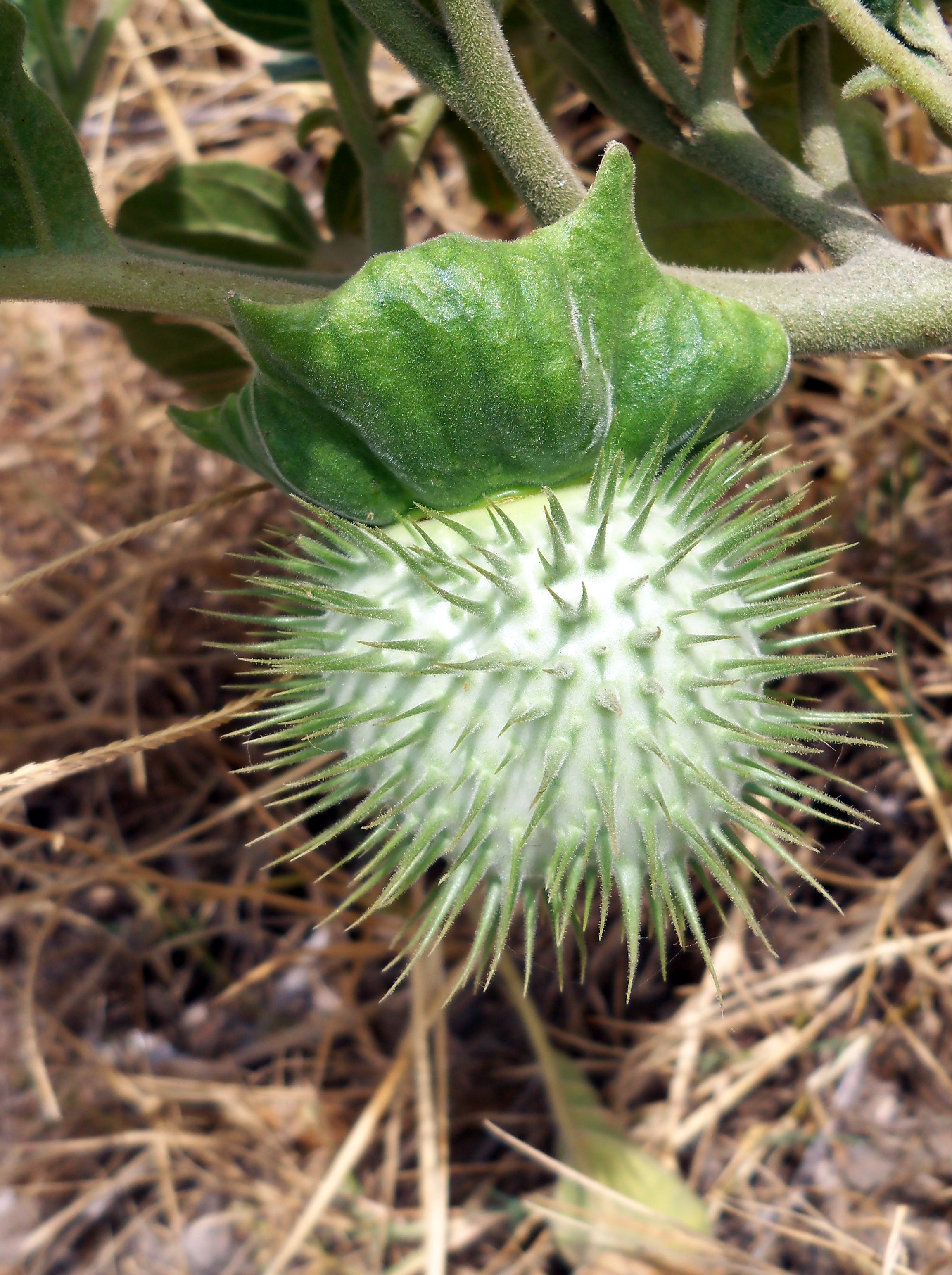 Datura innoxia : Fruto inmaduro - Playa de Calarreona, Águilas (Murcia, España).